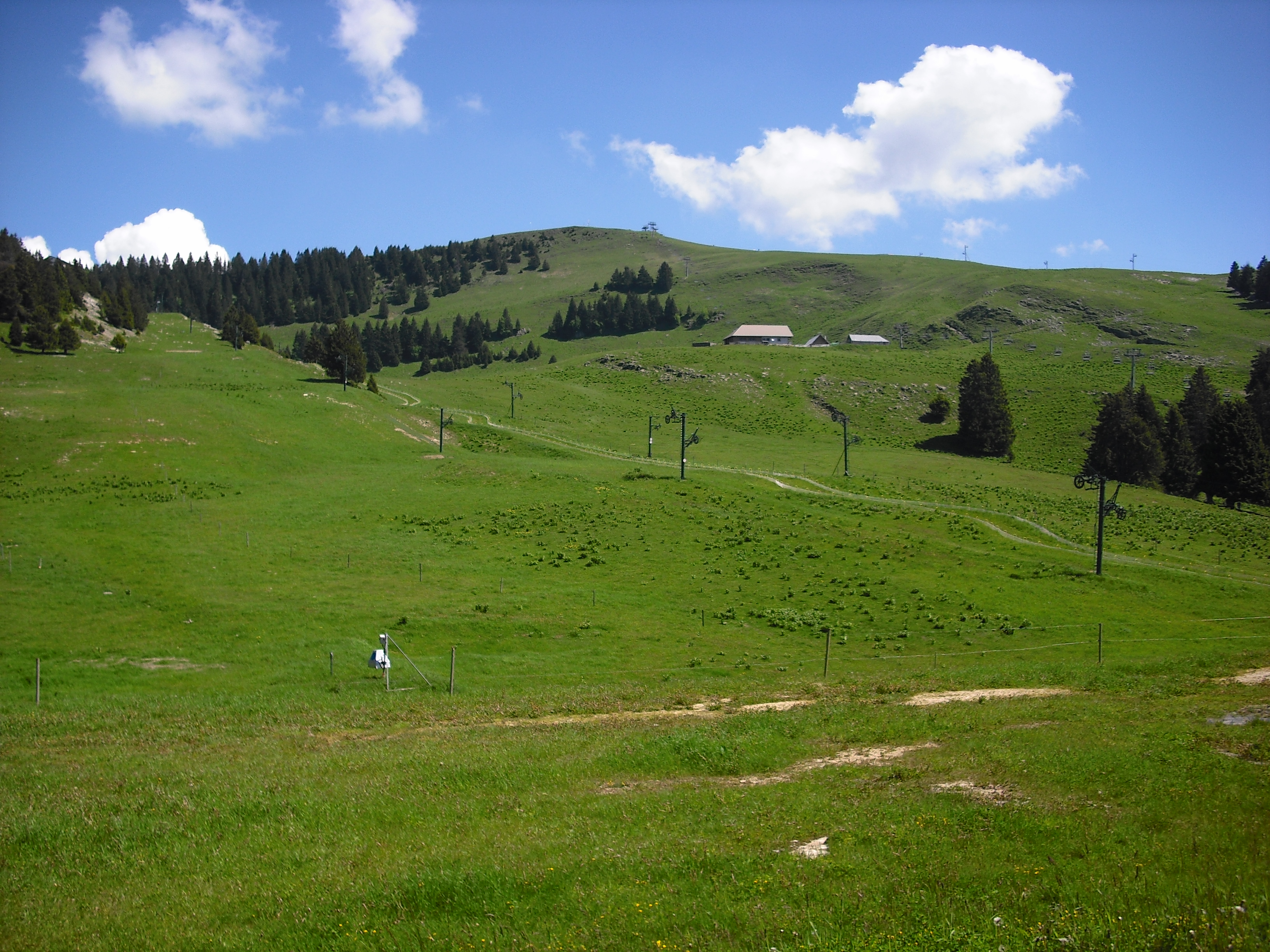 le semnoz en aout